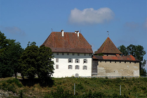 Schloss Vaulruz (privat - kann gemietet werden)